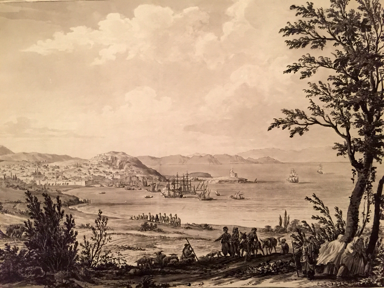 Christian Kamsetzer, Scala Nova, Kuşadası 1777